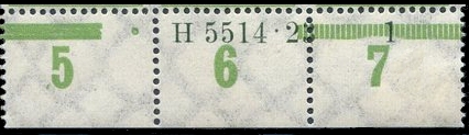 Bogenrand mit Hausauftragsnummer (HAN) bei Briefmarkenausgabe von 1923